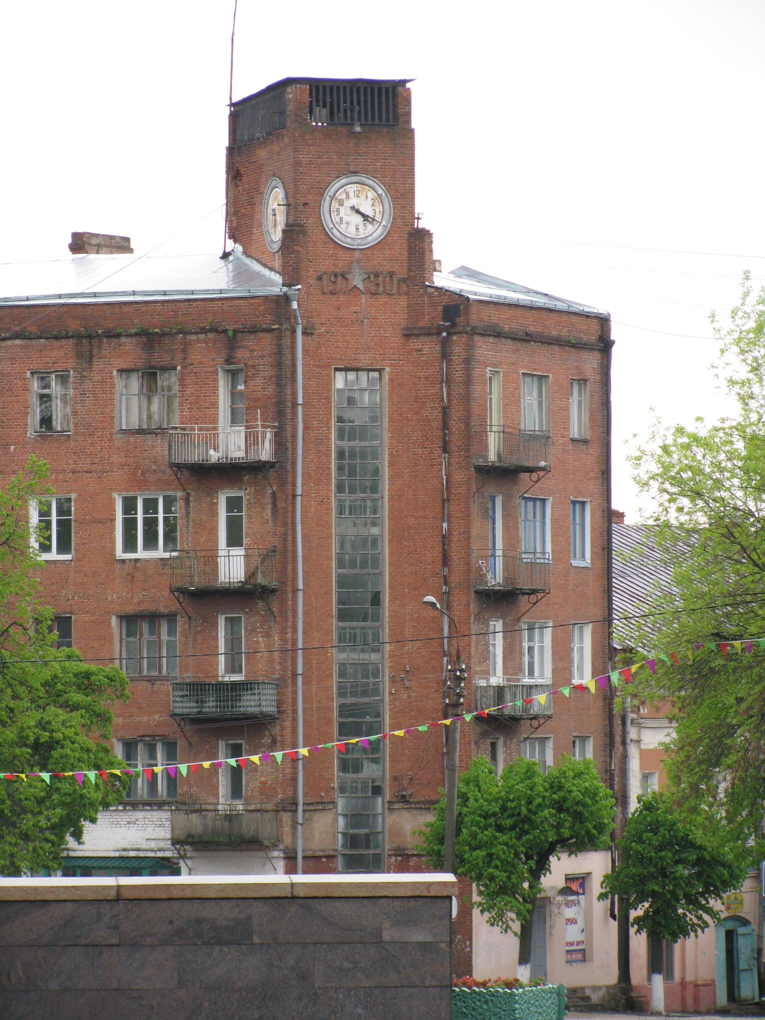 Serpukhov, Lenin Square, 12. City clock. Square Complex - Federal Landmark (Серпухов: площадь Ленина, 12. Городские часы. Ансамбль площади - памятник архитектуры федерального значаения)